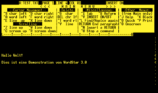 Screenshot von WordStar 3.0